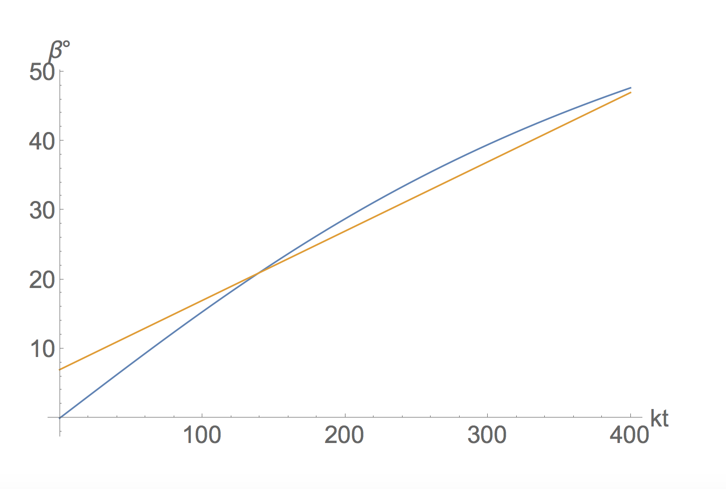 Bank angle for standard curve vs speed